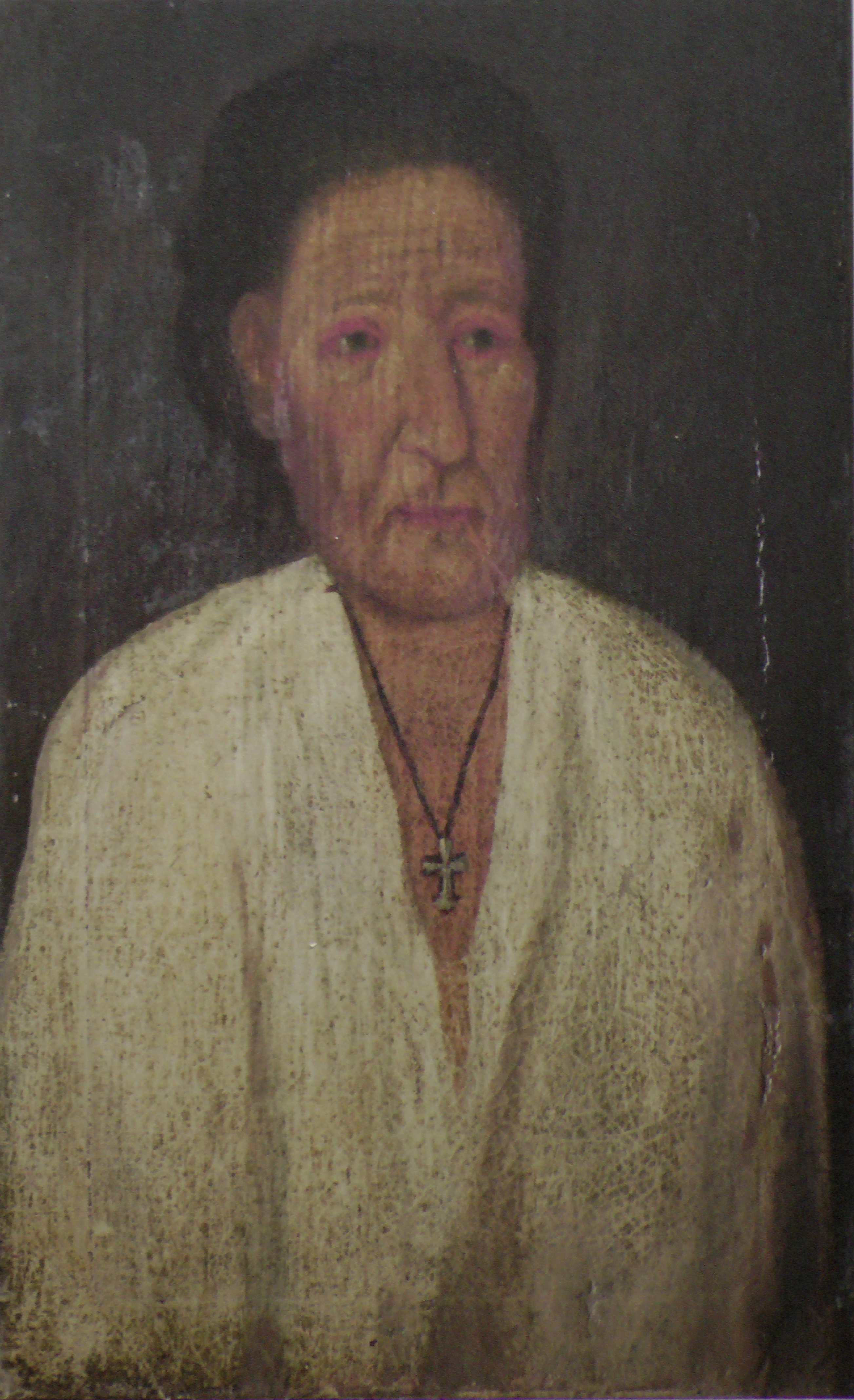 Неизвестный художник XVIII – начала XX века. Портрет юродивой Ксении Петровой (Портрет Ксении Петербургской). Эрмитаж, Санкт-Петербург. До реставрации.